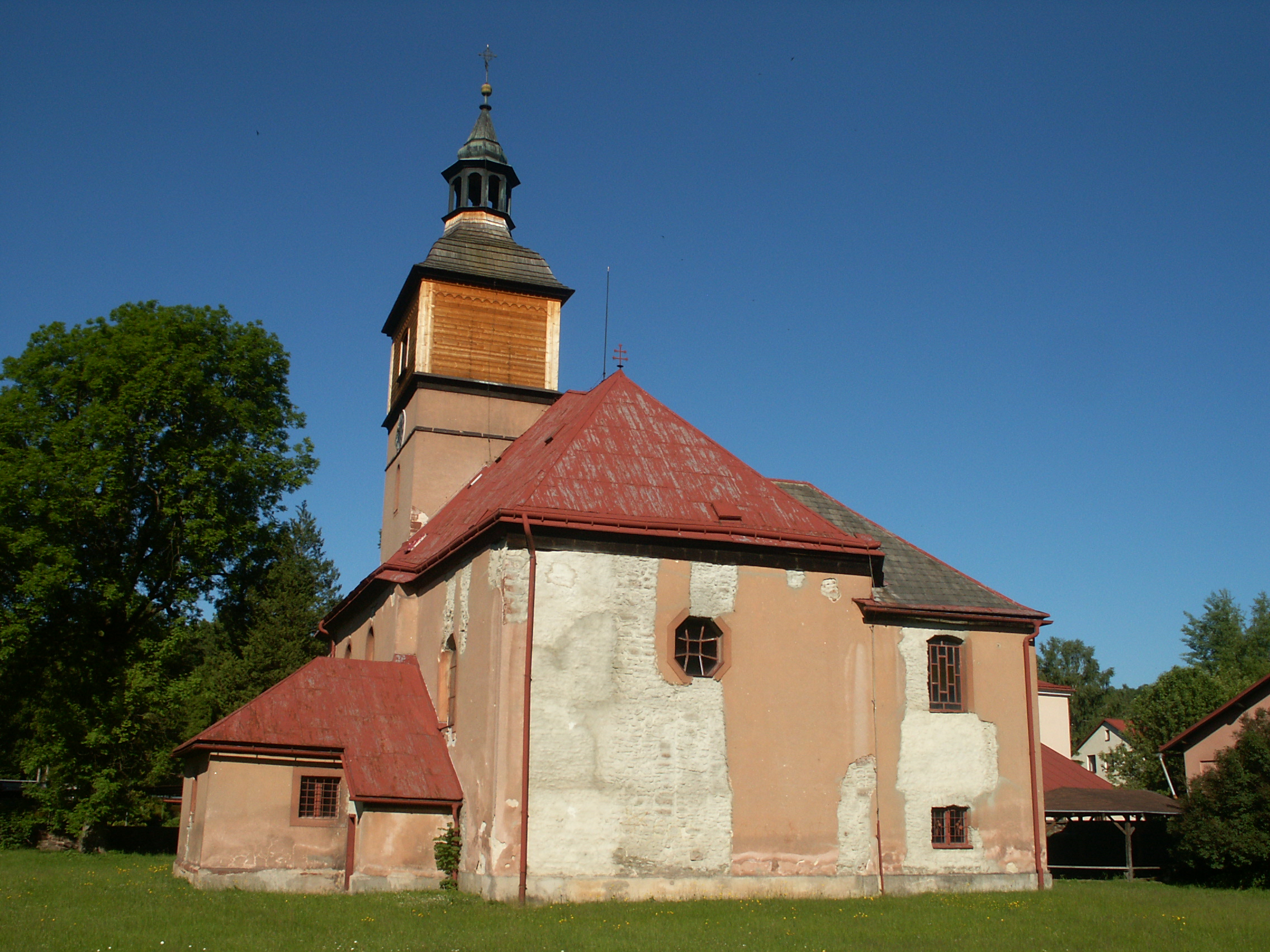 Horní Staré Město - kostel sv. Václava od SV